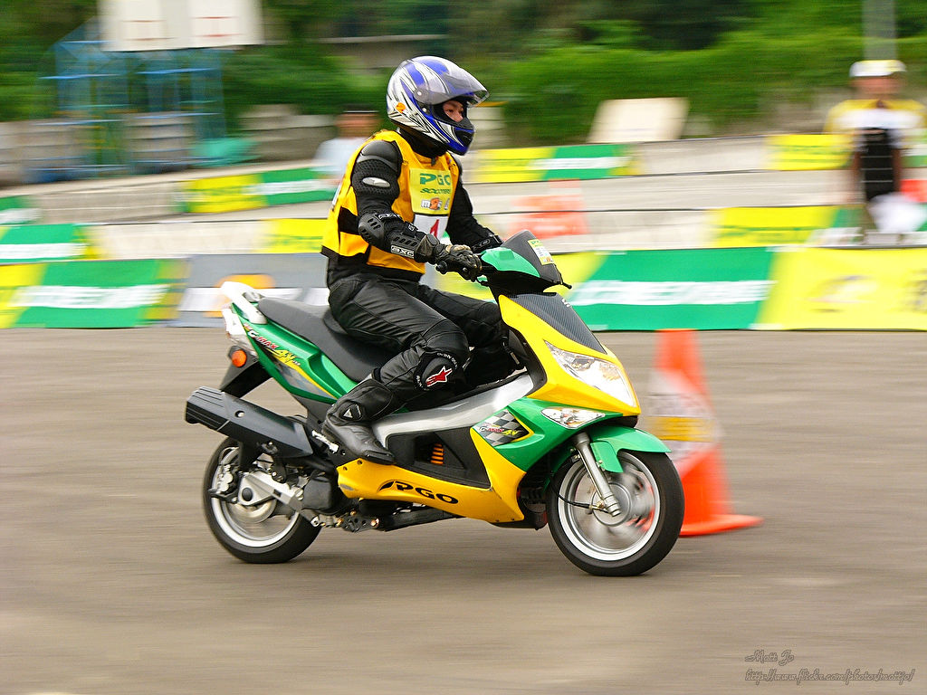 PGO G-MAX 4V